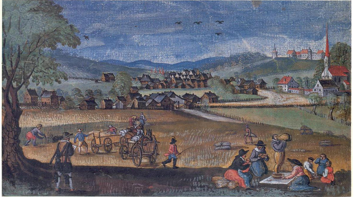 Reichsgrafschaft Ortenburg mit Schloss Alt-Ortenburg nach einem Aquarell des Grafen Friedrich Casmimirs